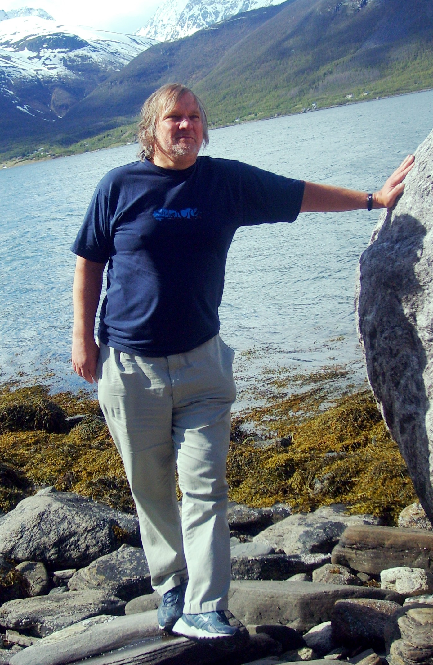 Urs Hostettler an der norwegischen Grenze.